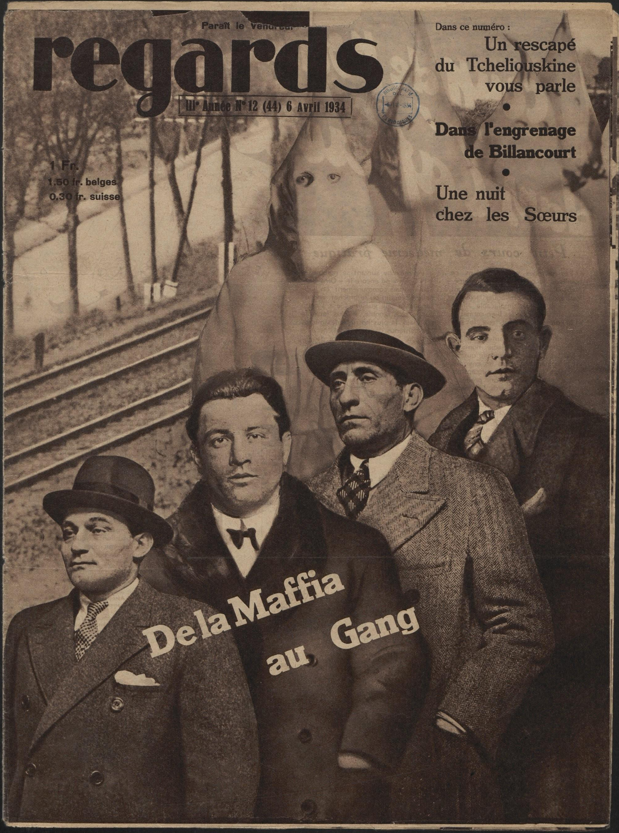 De bas en haut (photomontage) : Paul Carbone, Georges Hainnaux, Gaëtan L'Herbon de Lussats et François Spirito, quatre malfrats un temps suspectés dans le cadre de l'affaire Prince, à la une de Regards, hebdomadaire communiste français, le 6 mars 1934.